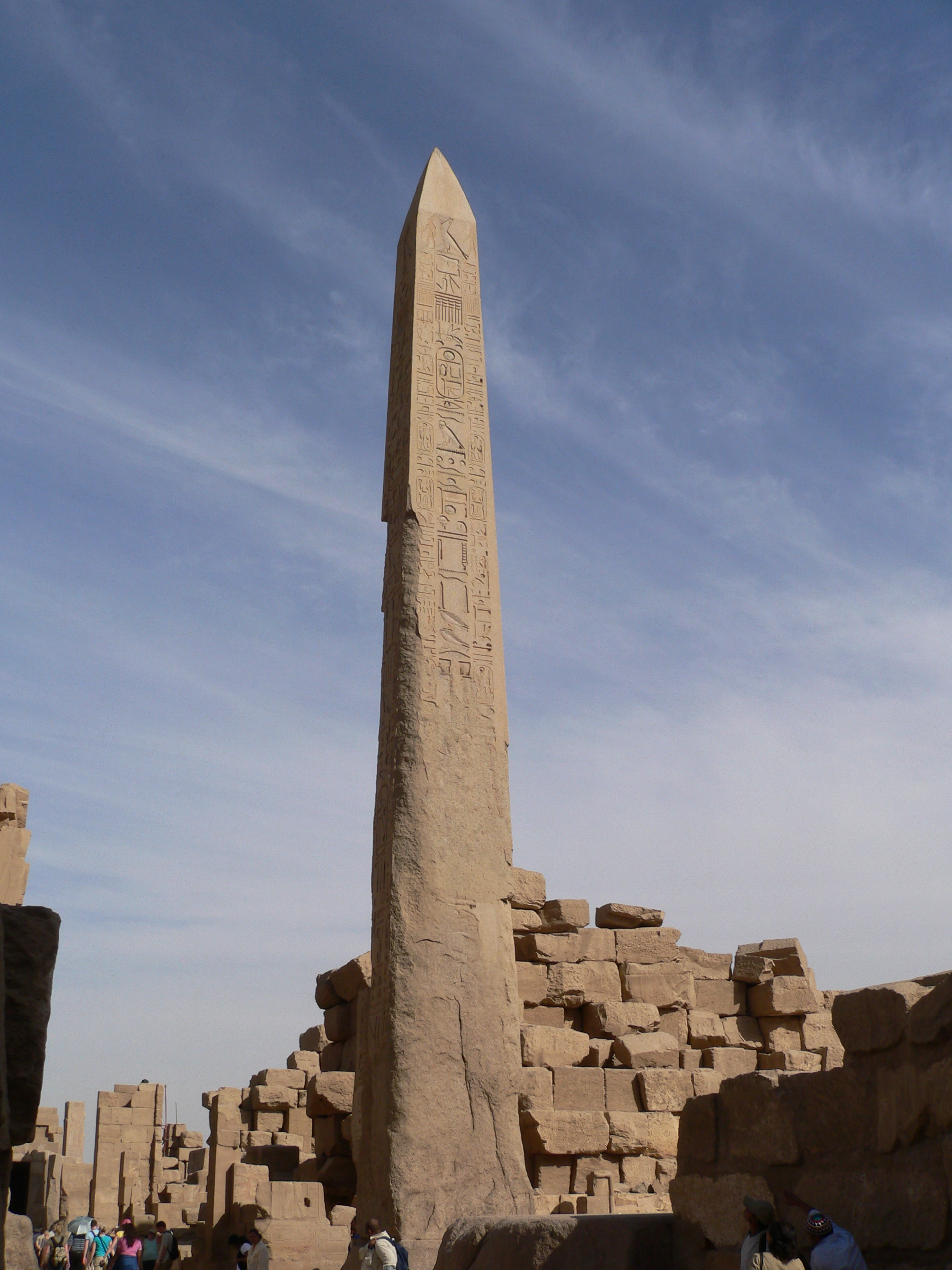 Obelisk at Karnak Temple